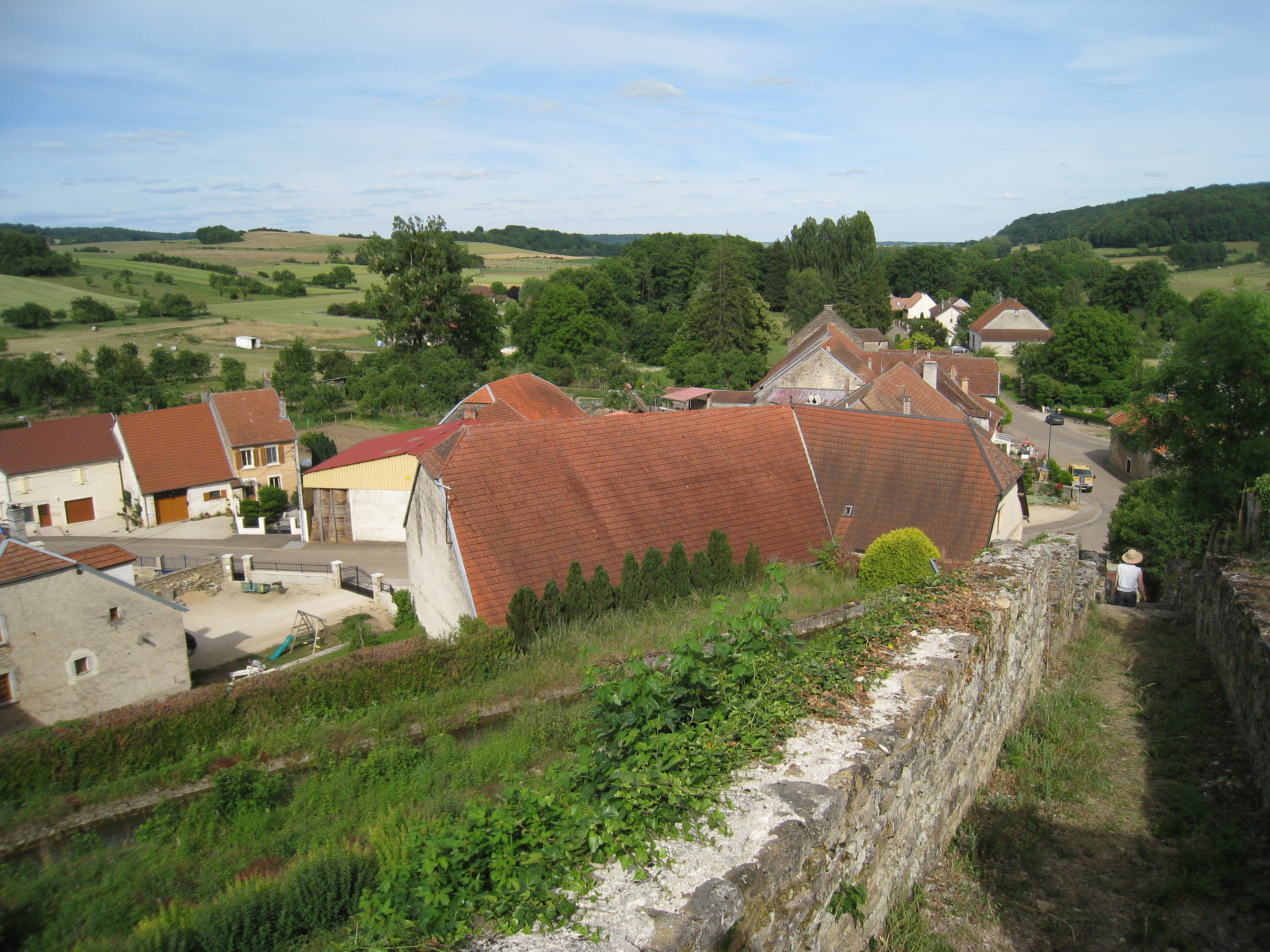 Le village à flanc de colline